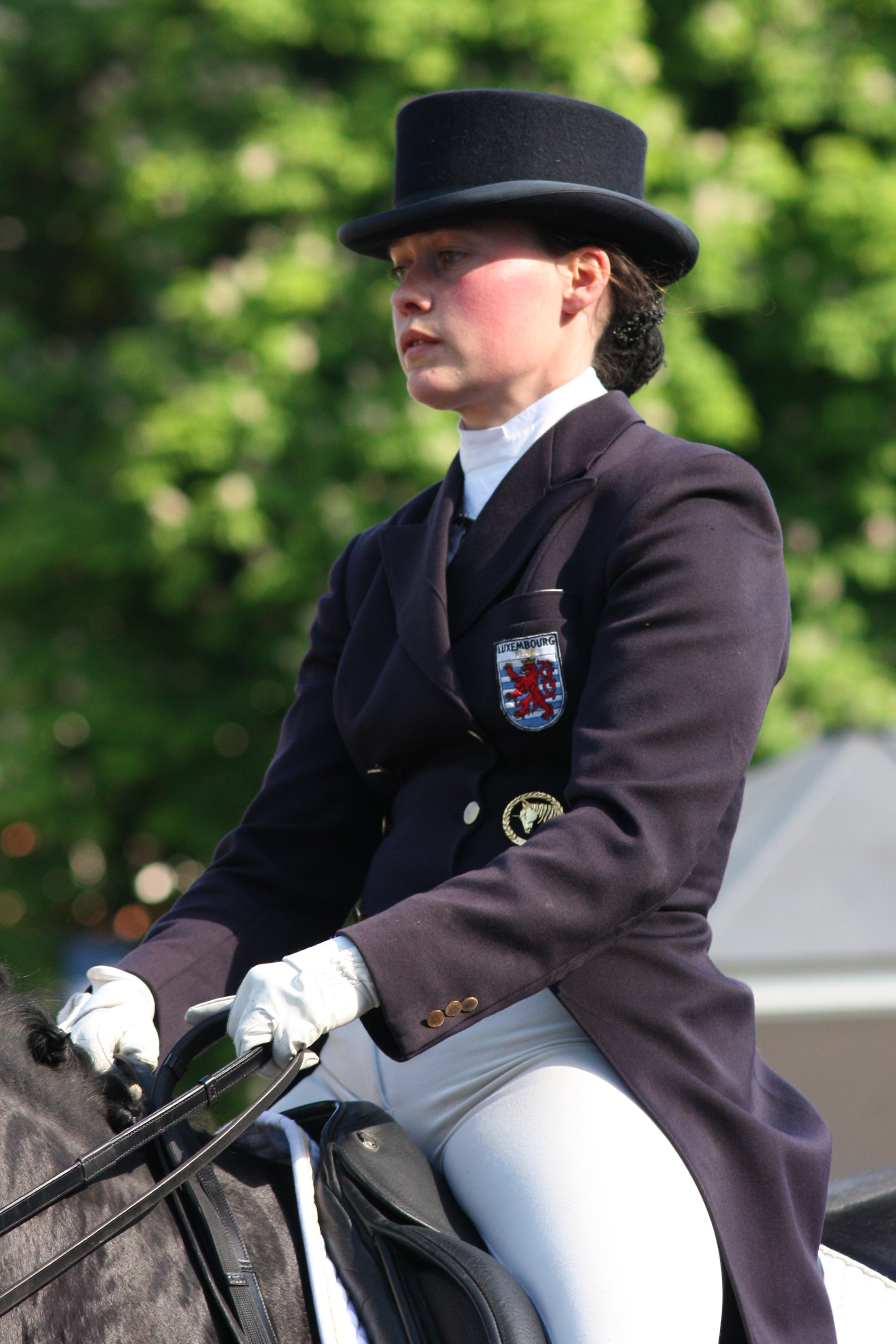 77. Internationales Pfingstturnier Wiesbaden 2013, CDI **** Dressurprüfung Grand Prix de Dressage, Erpelding, Diane mit Woltair TSF Personality rights warning Although this work is freely licensed or in the public domain, the person(s) shown may have rights that legally restrict certain re-uses unless those depicted consent to such uses. In these cases, a model release or other evidence of consent could protect you from infringement claims.